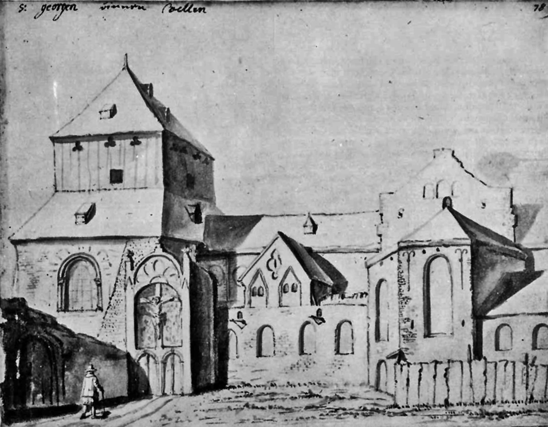 St. Georg von Süden, im Vordergrund links der gewölbte Verbindungsgang zur Pfarrkirche St. Jakob. Justus Finkenbaum, Köln 17. Jahrhundert. Das Blatt ist benannt als „s. georgen binnen Coellen“